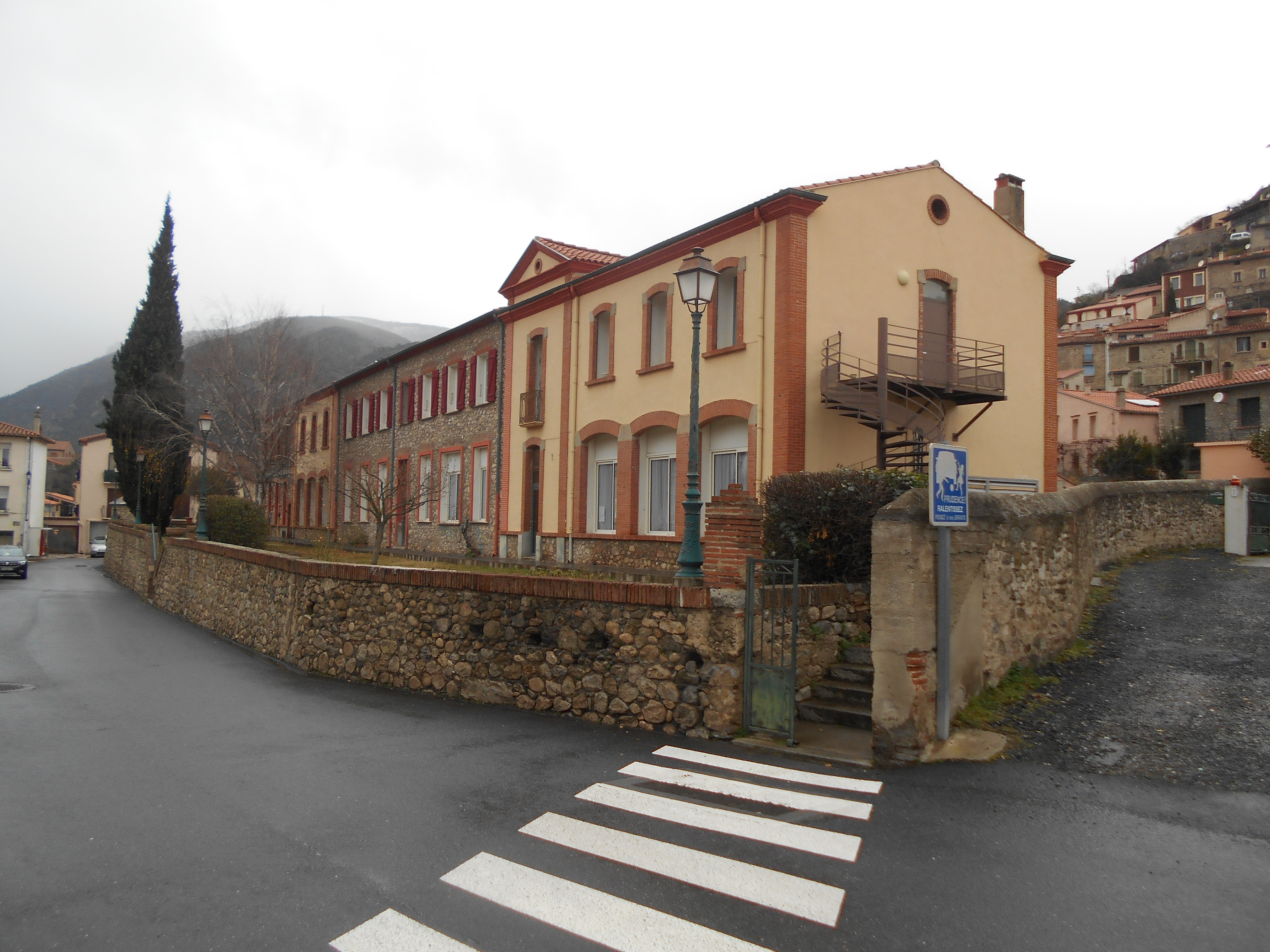 Les escoles de Rià.